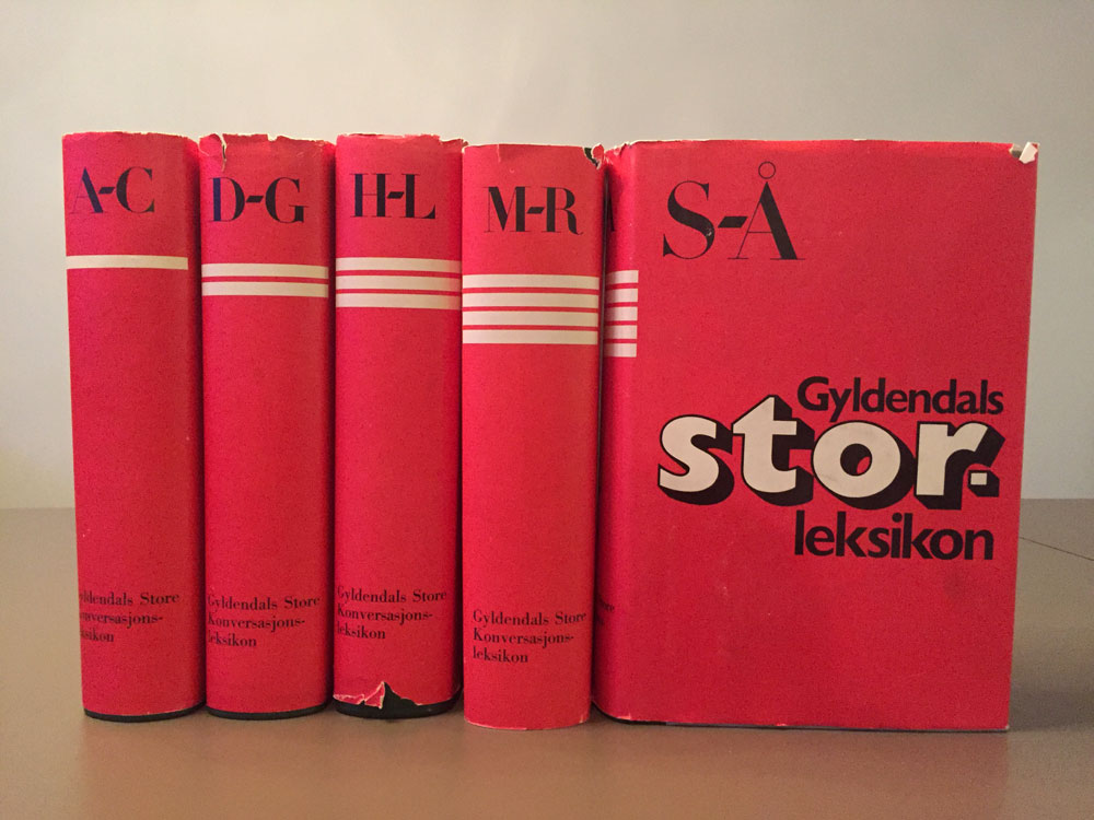 Gyldendals konversasjonsleksikon